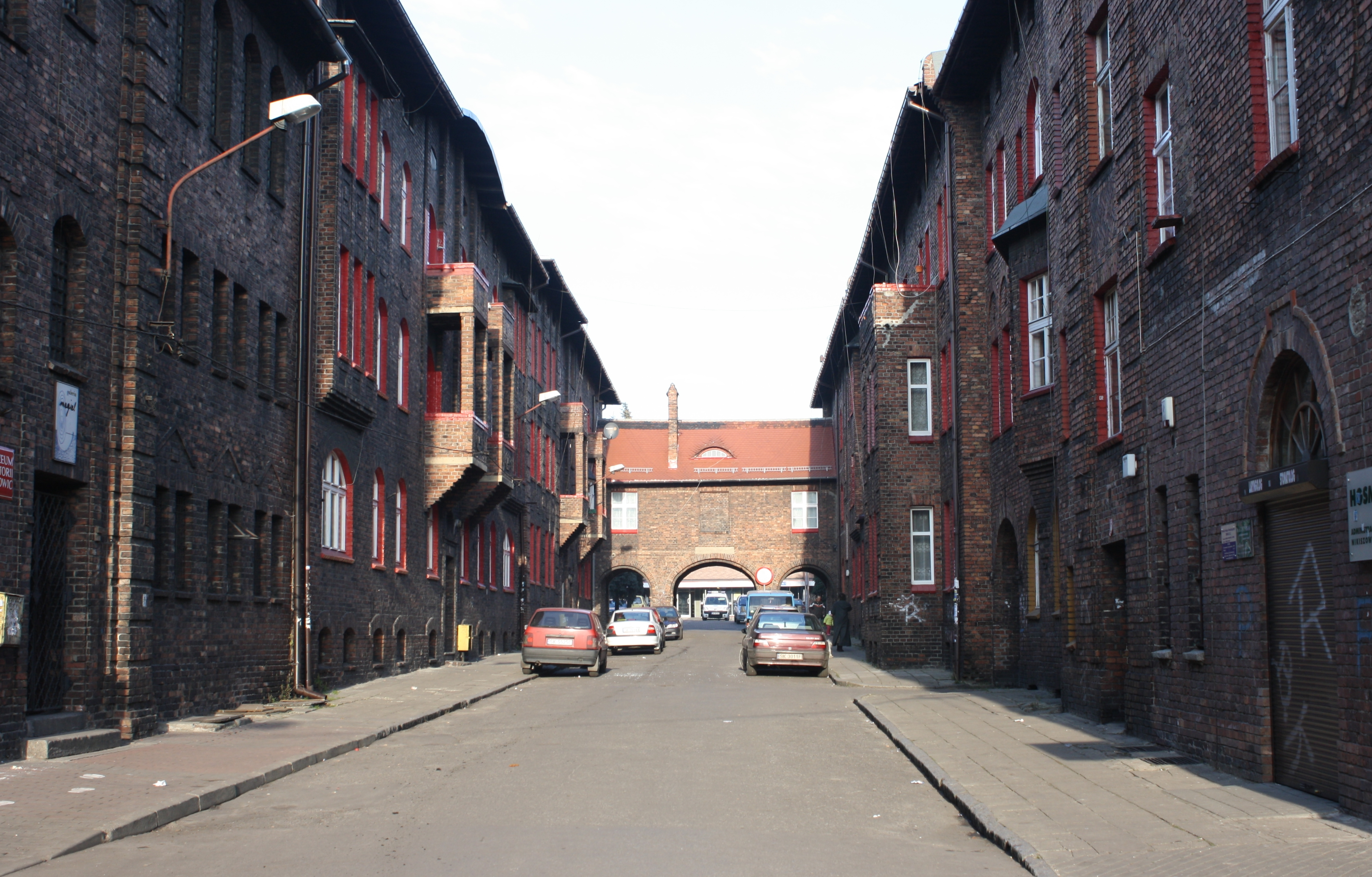 katowice - Nikiszowiec, fragment osiedla.